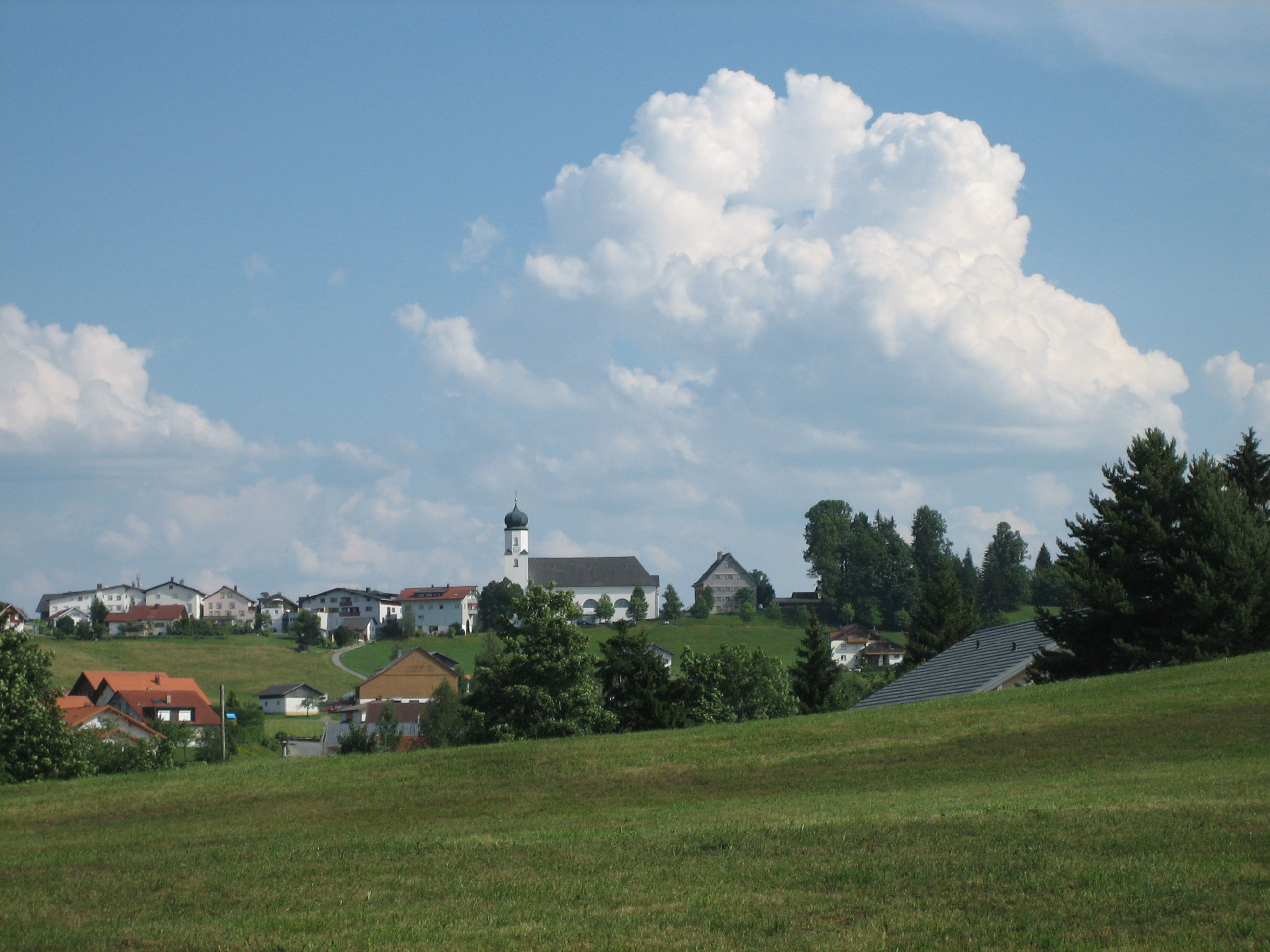 Sulzberg mit Gewitterwolken